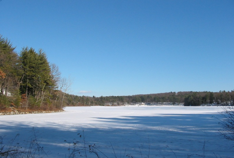 Walden Pond in winter, 13-Feb-2005.